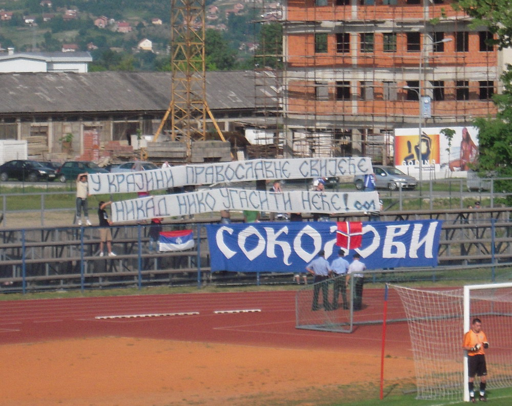 Sokolovi,_navijači_Slavije.